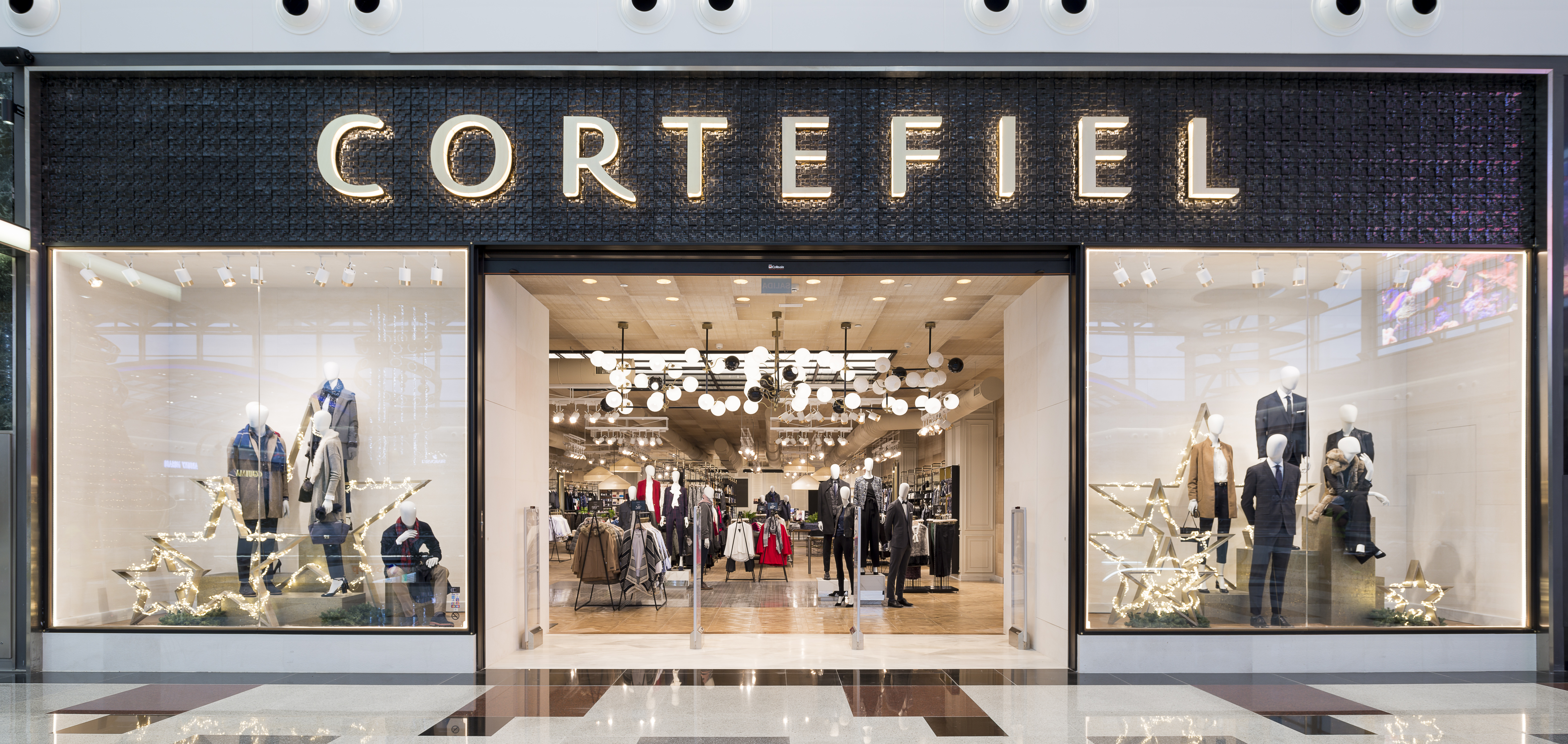 CCNevada Fachada Cortefiel